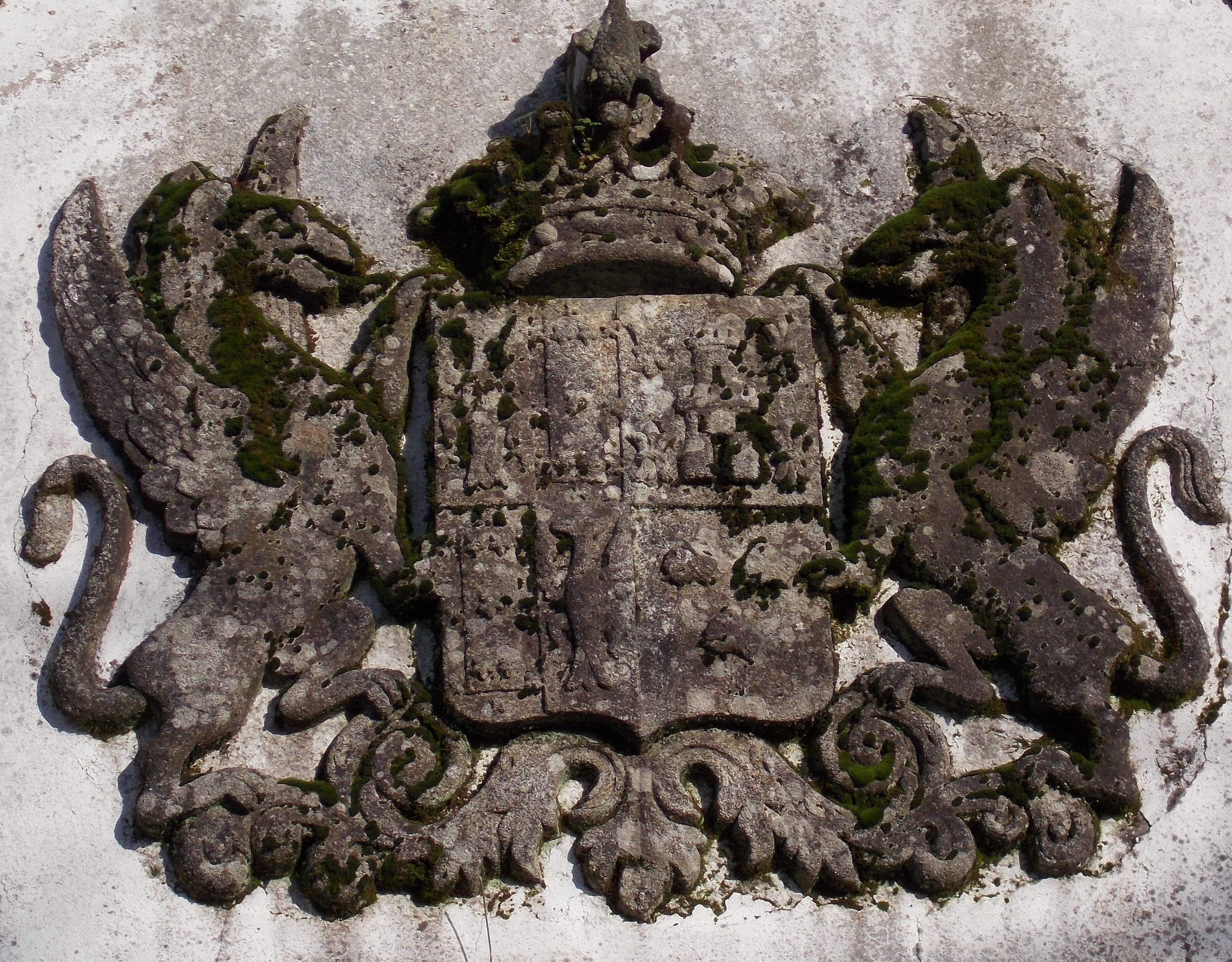 Brasão Conde de Carcavelos no paço de Couciero, Vila Verde